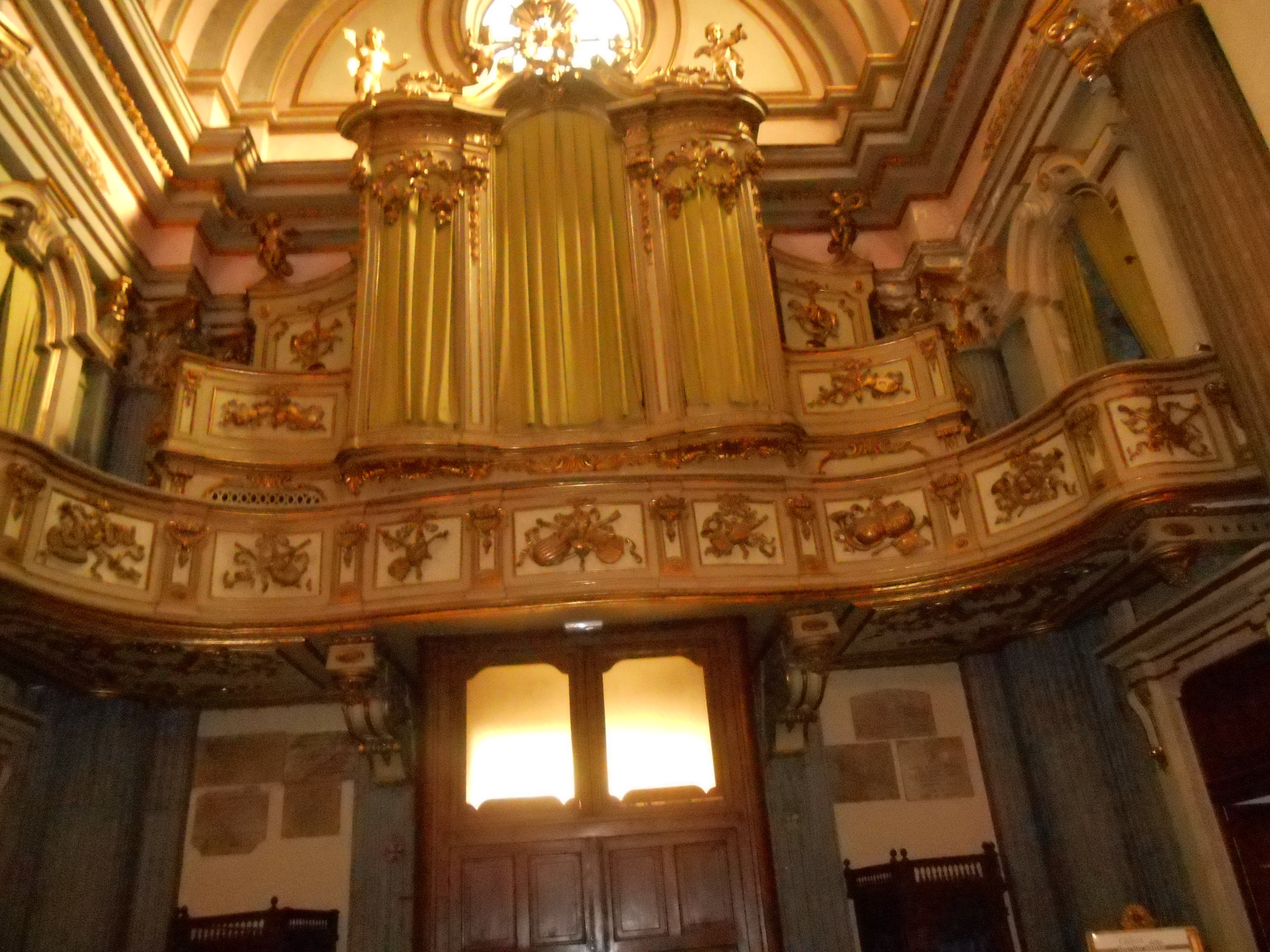 Cantoria della chiesa di Santo Spirito a Torino